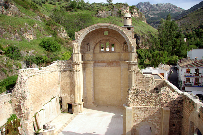 Iglesia de Santa Maria en Cazorla, Jaen.